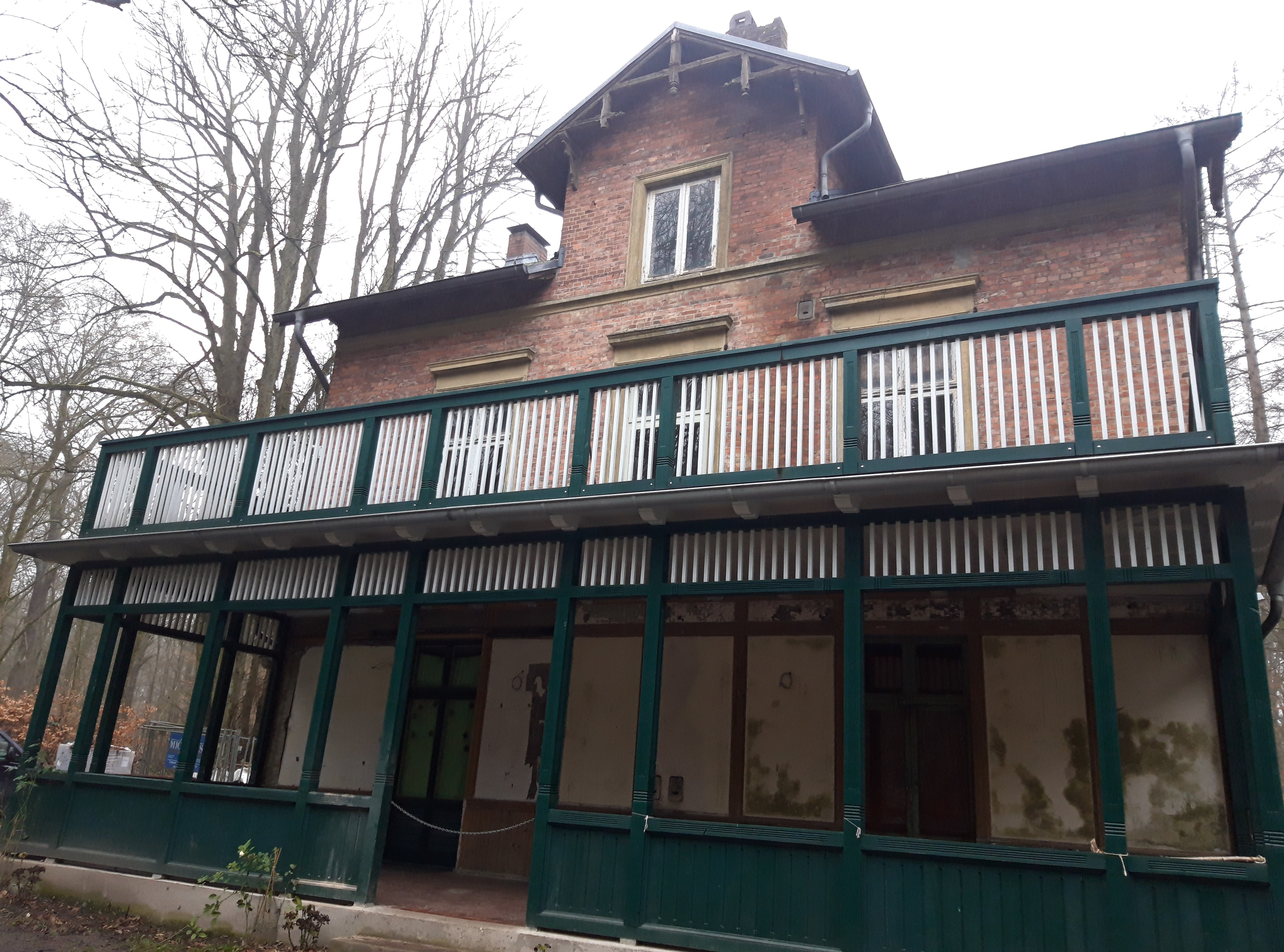 Villa Mutzenbecher im Niendorfer Gehege